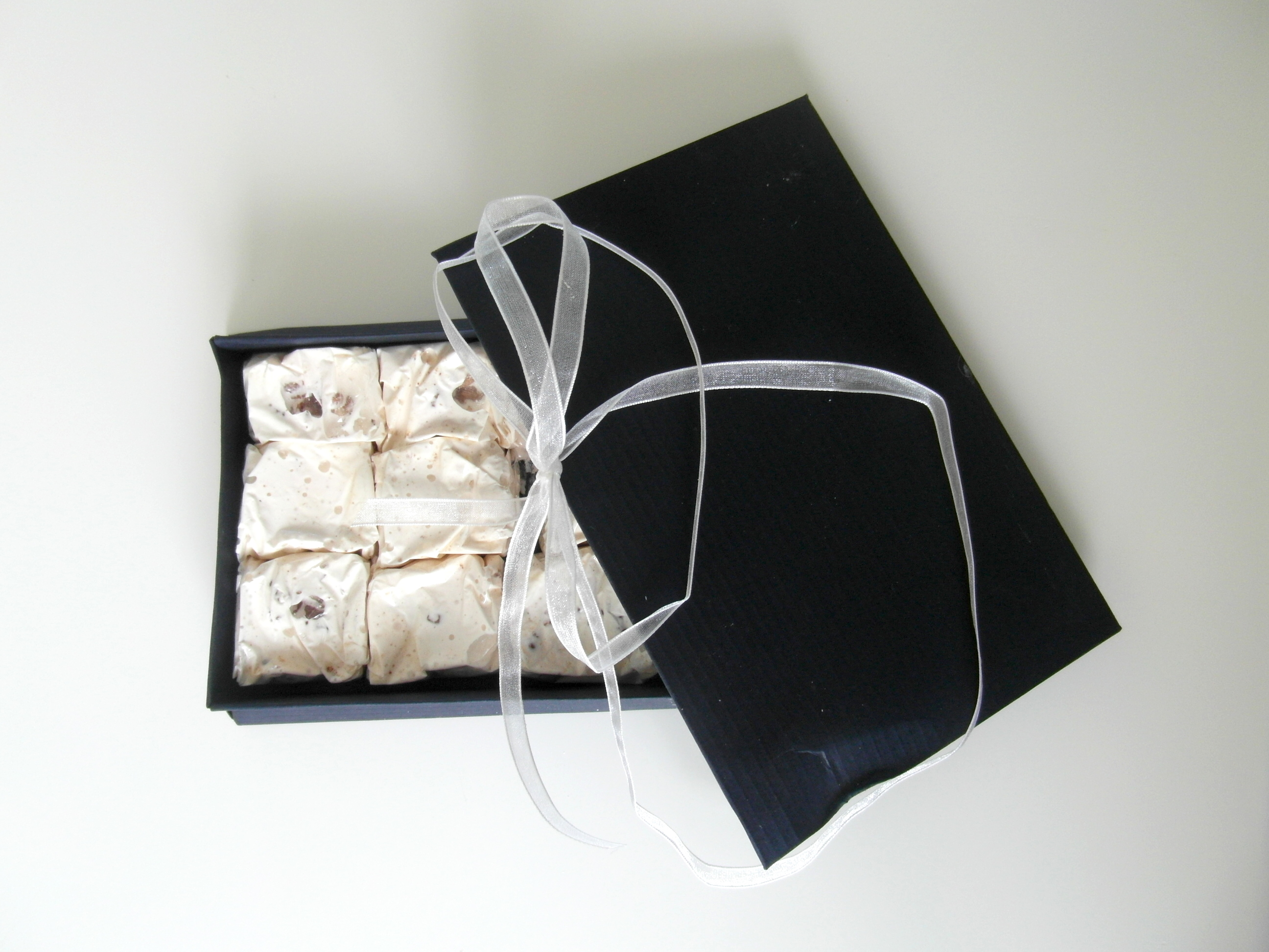 Ballotin de djawzia